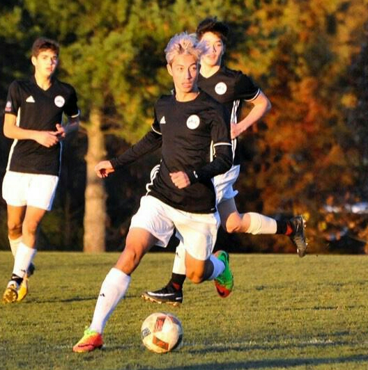 郝子聲於Manhattan Soccer Club